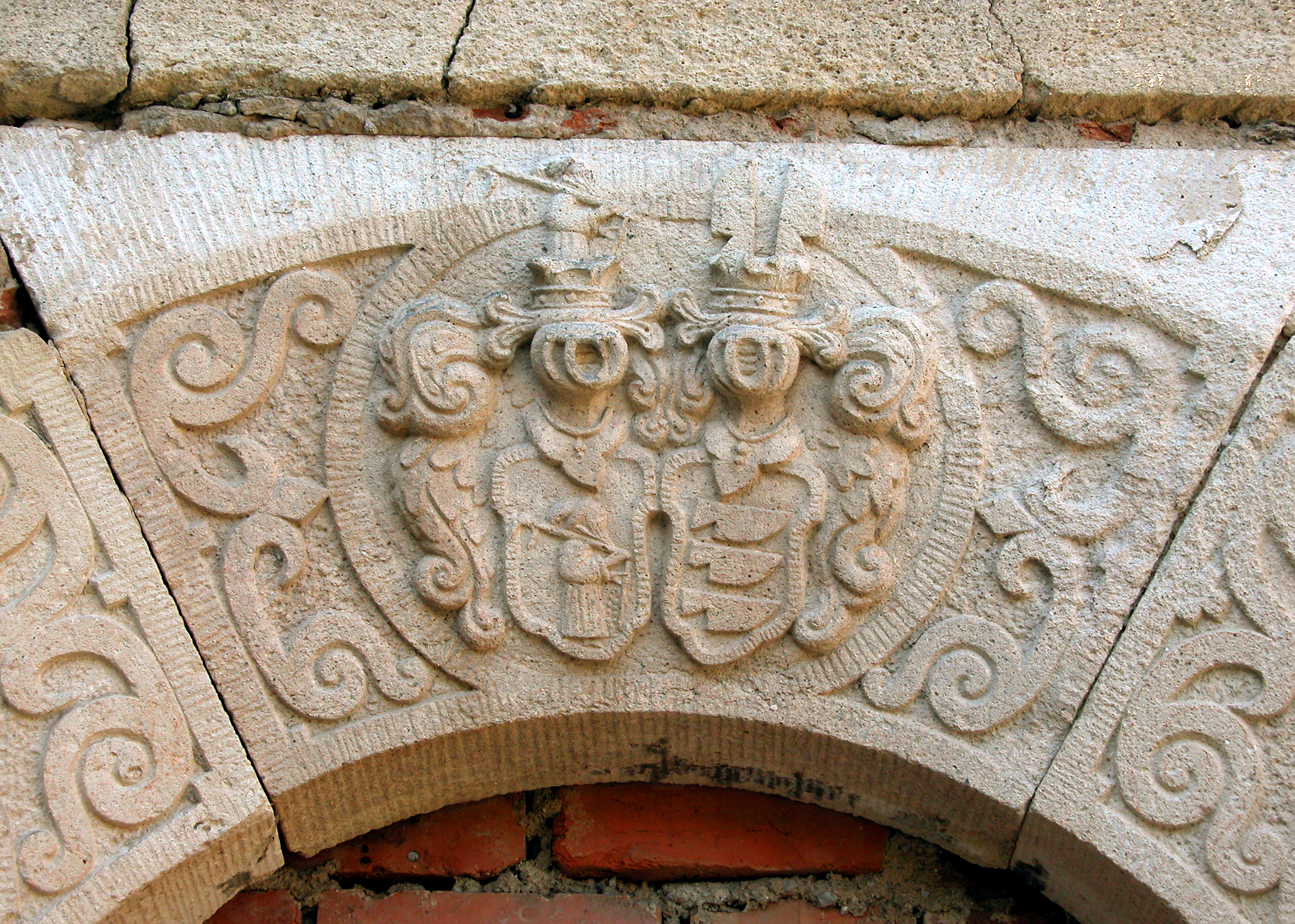 01.09.2009 04643 Syhra (Geithain), Hauptstraße 1: Ehemaliges Rittergut, Sicht vom Hof zum westlichen Wirtschaftsgebäude (GMP: 51.037881,12.645874) mit einem Sitznischenportal aus der Mitte des 17. Jahrhunderts, das offenbar aus dem Schloß (GMP: 51.037586,12.646014) stammt und hier in Zweitverwendung eingefügt wurde. Die Wappen über dem Renaissanceportal beziehen sich auf Innocenz von Einsiedel und seine zweite Ehefrau Dorothea aus dem Winckel. [DSCN38743.TIF]20090901285DR.JPG(c)Blobelt